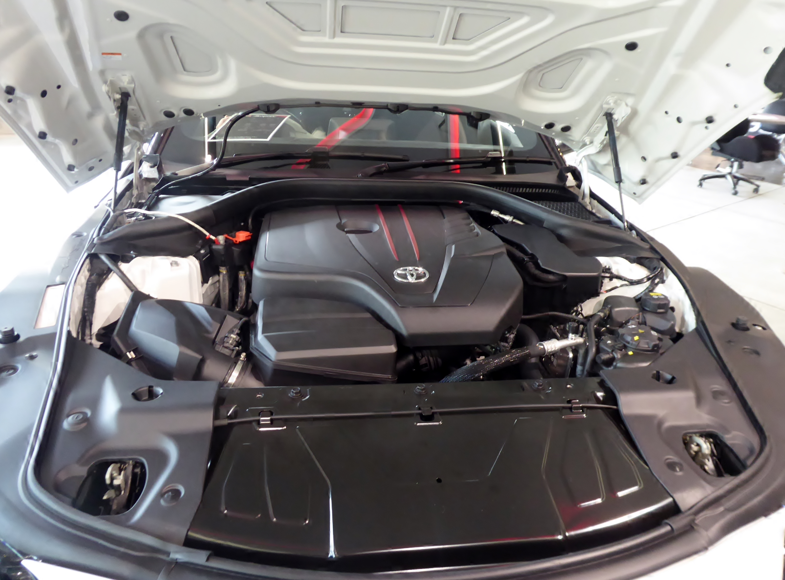 3BA-DB22-ZTRW型トヨタ・GRスープラSZ-Rのエンジンルームを撮影。